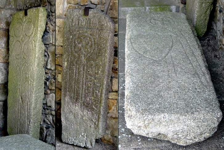 Stèles, chapelle Saint-Anne, Le Pallet, Loire-Atlantique, France.